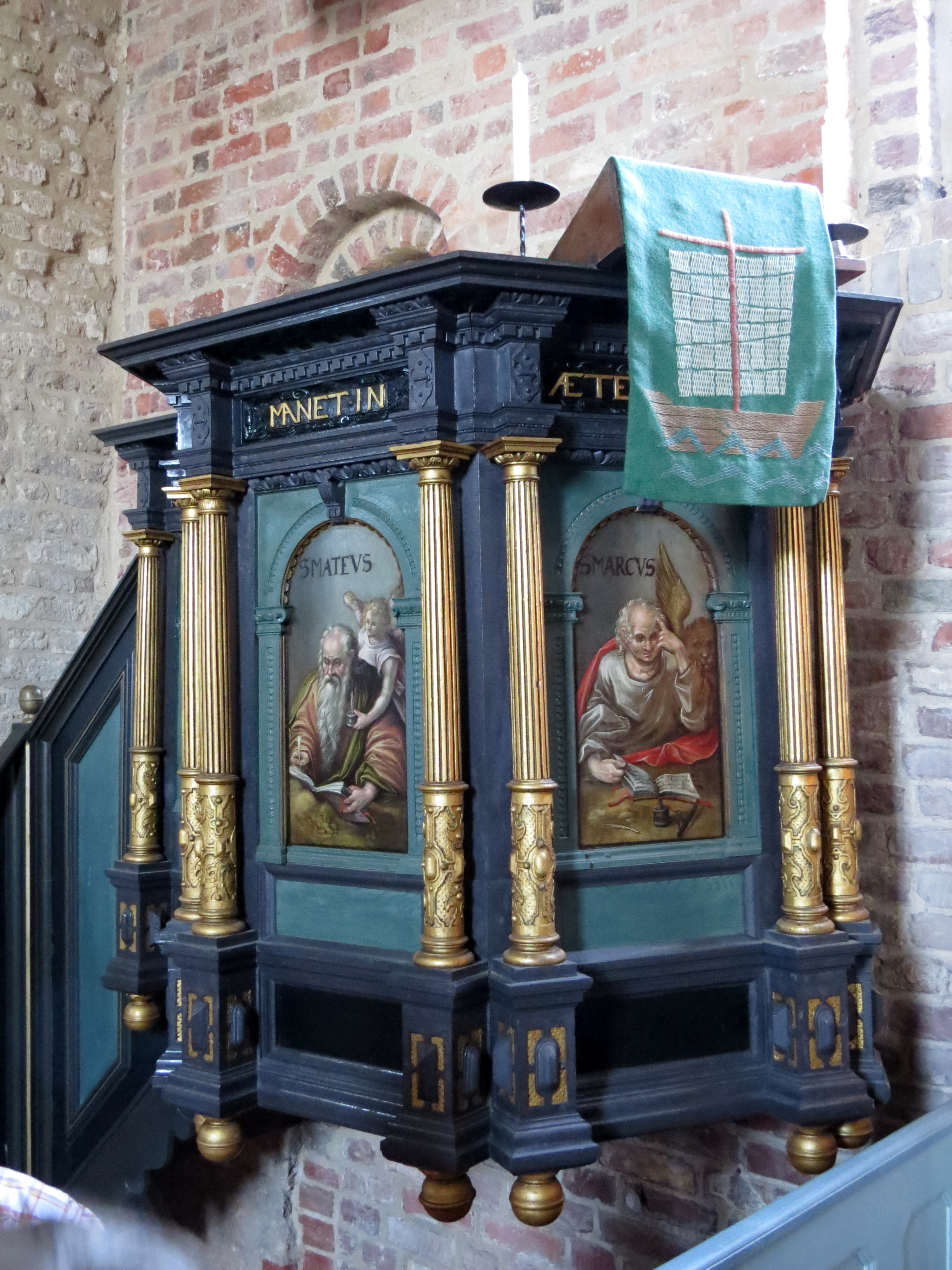 Kanzel der Alten Kirche Pellworm, Schleswig-Holstein